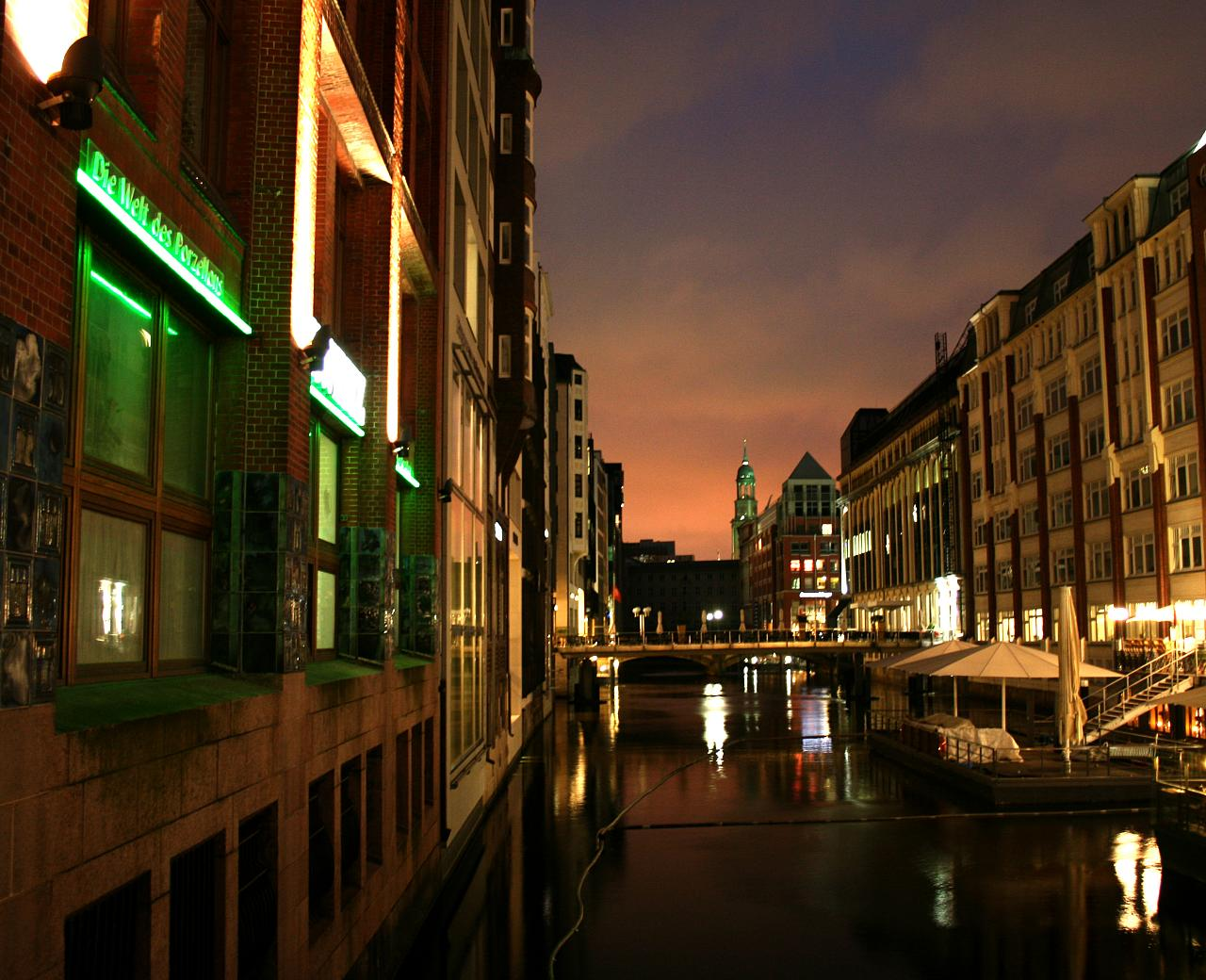 Hamburg Innenstadt Bleichenfleet bei Sonnenuntergang